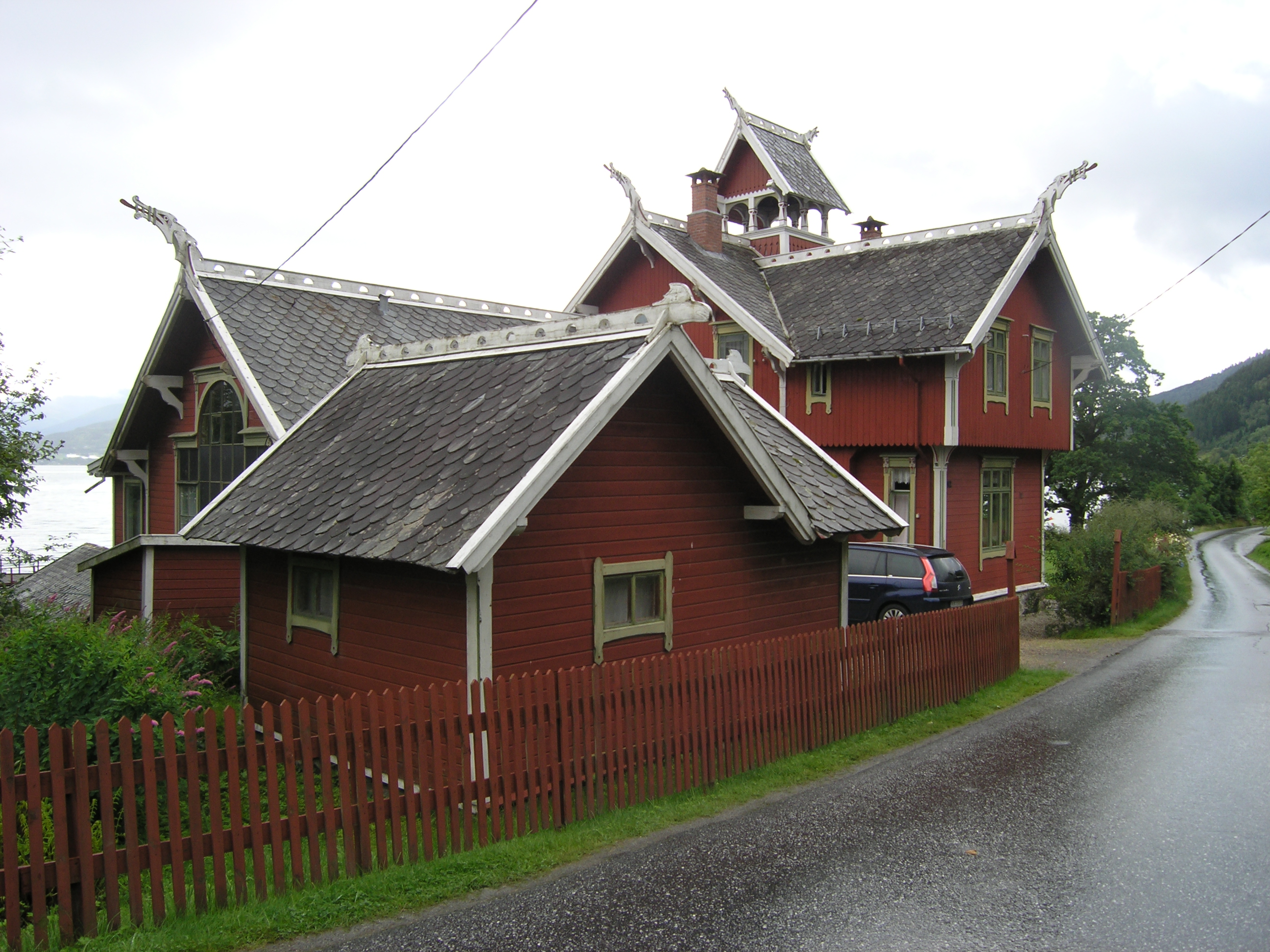 Villa i drakestil i Holmen i Balestrand